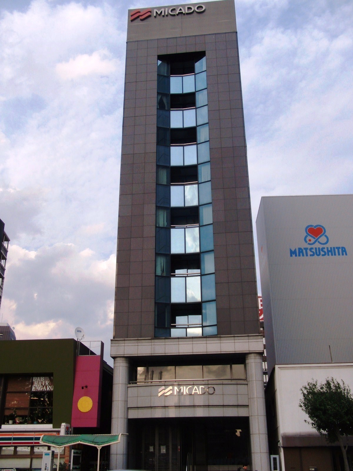 株式会社ミカドの本社の入居していた社屋を撮影。